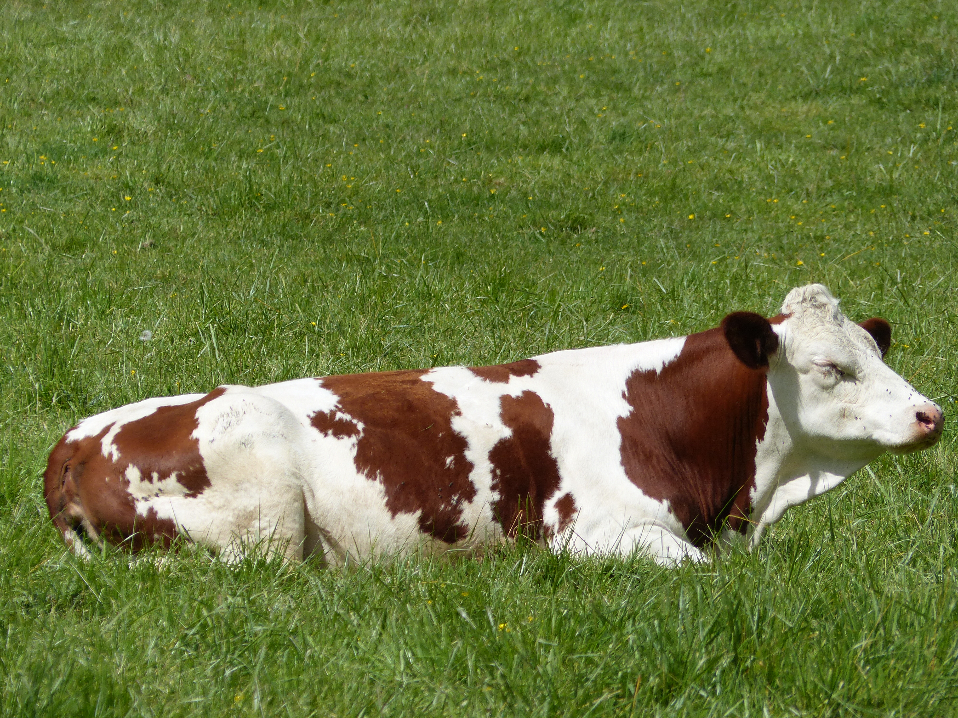 Génisse (jeune vache) de race red holstein dans le Morbihan